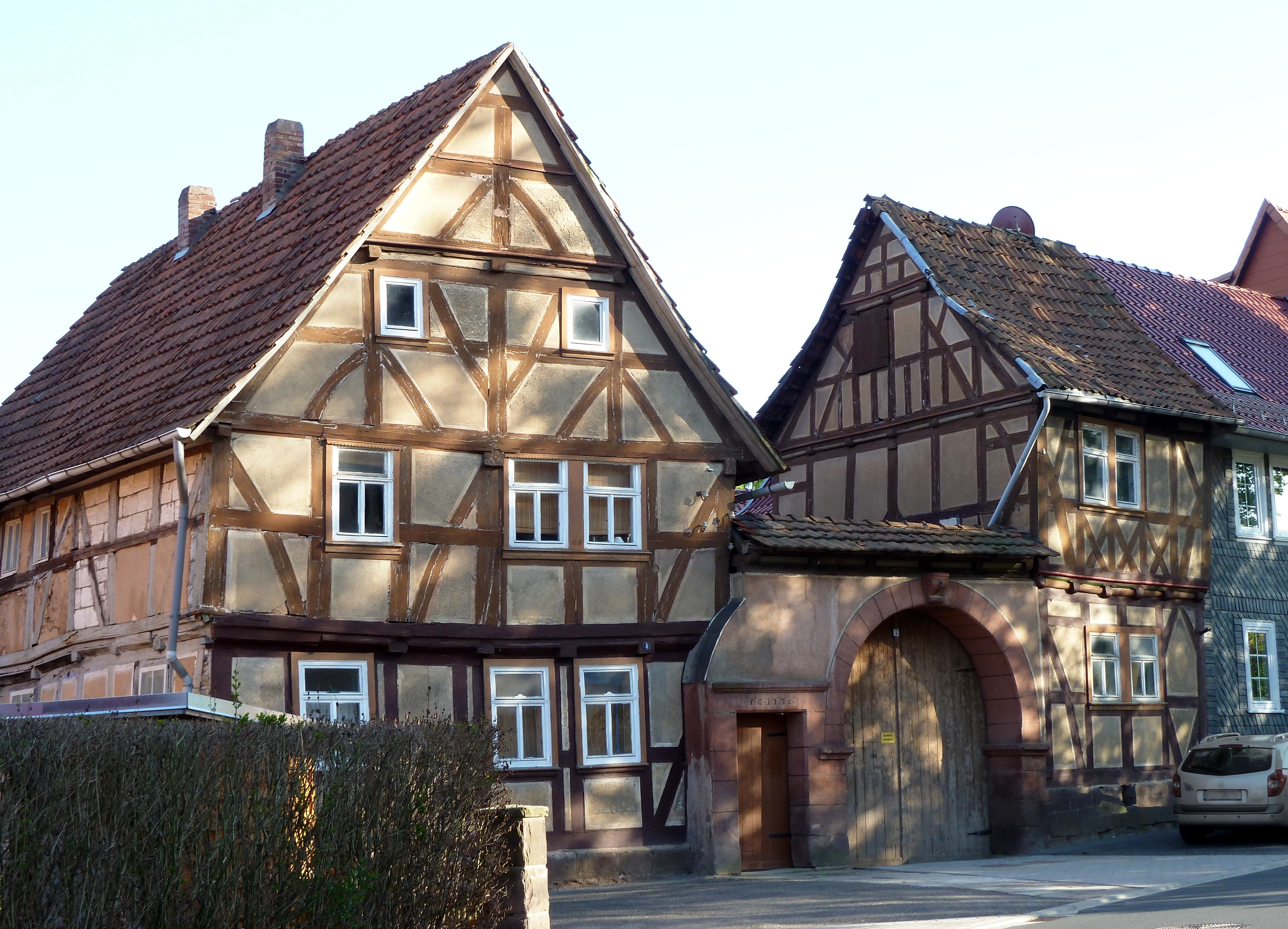 Knorrsches Haus in Uder, Landkreis Eichsfeld, Thüringen. Gilt als ältestes Haus in Uder, errichtet Anfang des 16. Jahrhunderts, Sanierung seit 2011.